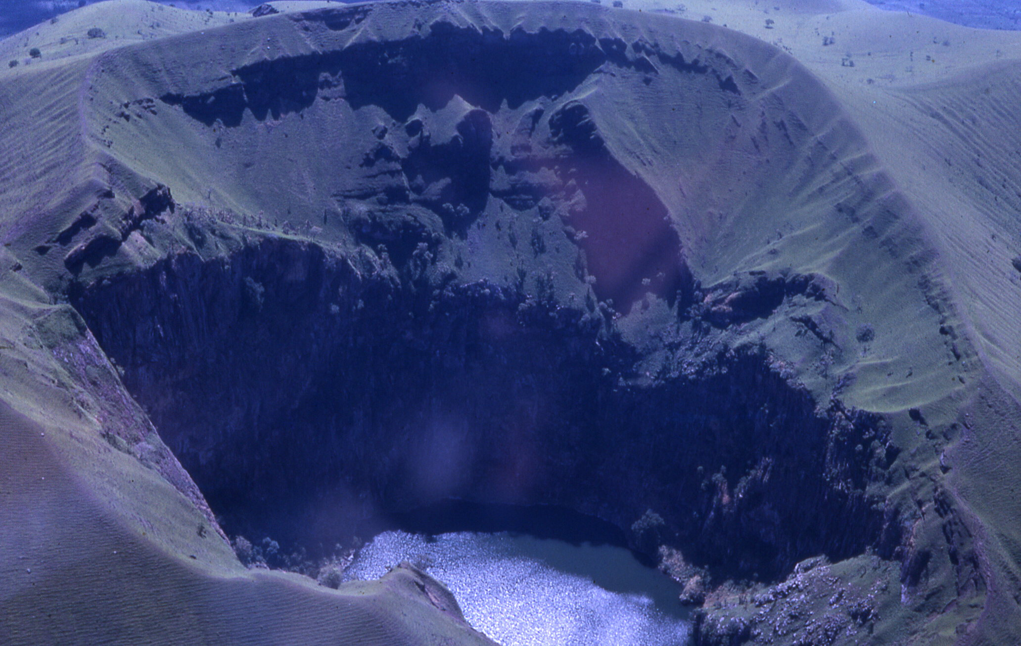 Le M'Bapit: Cratère et son lac tranquille.